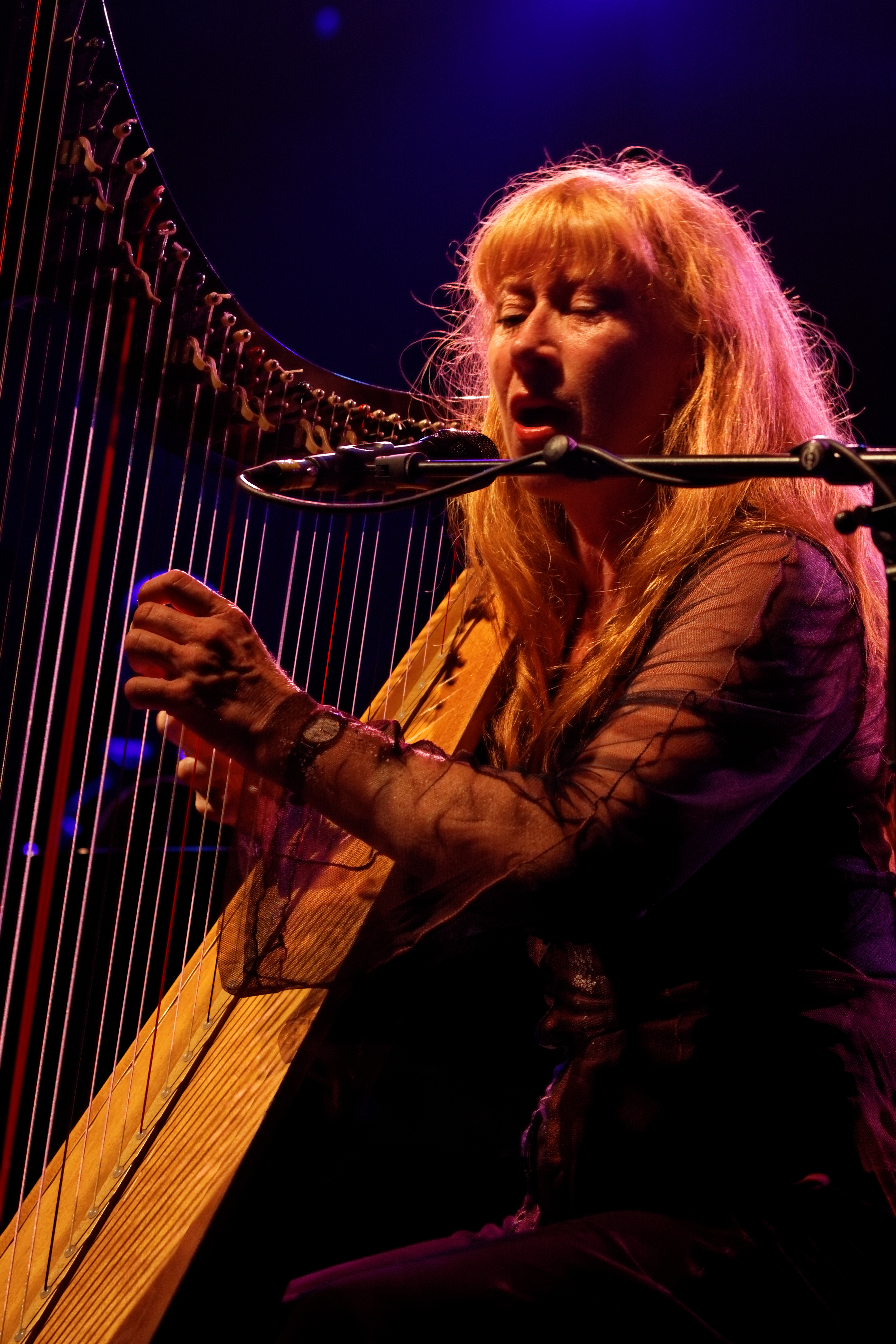 Loreena McKennitt en concert à l'espace Gradlon lors du festival de Cornouaille 2012.